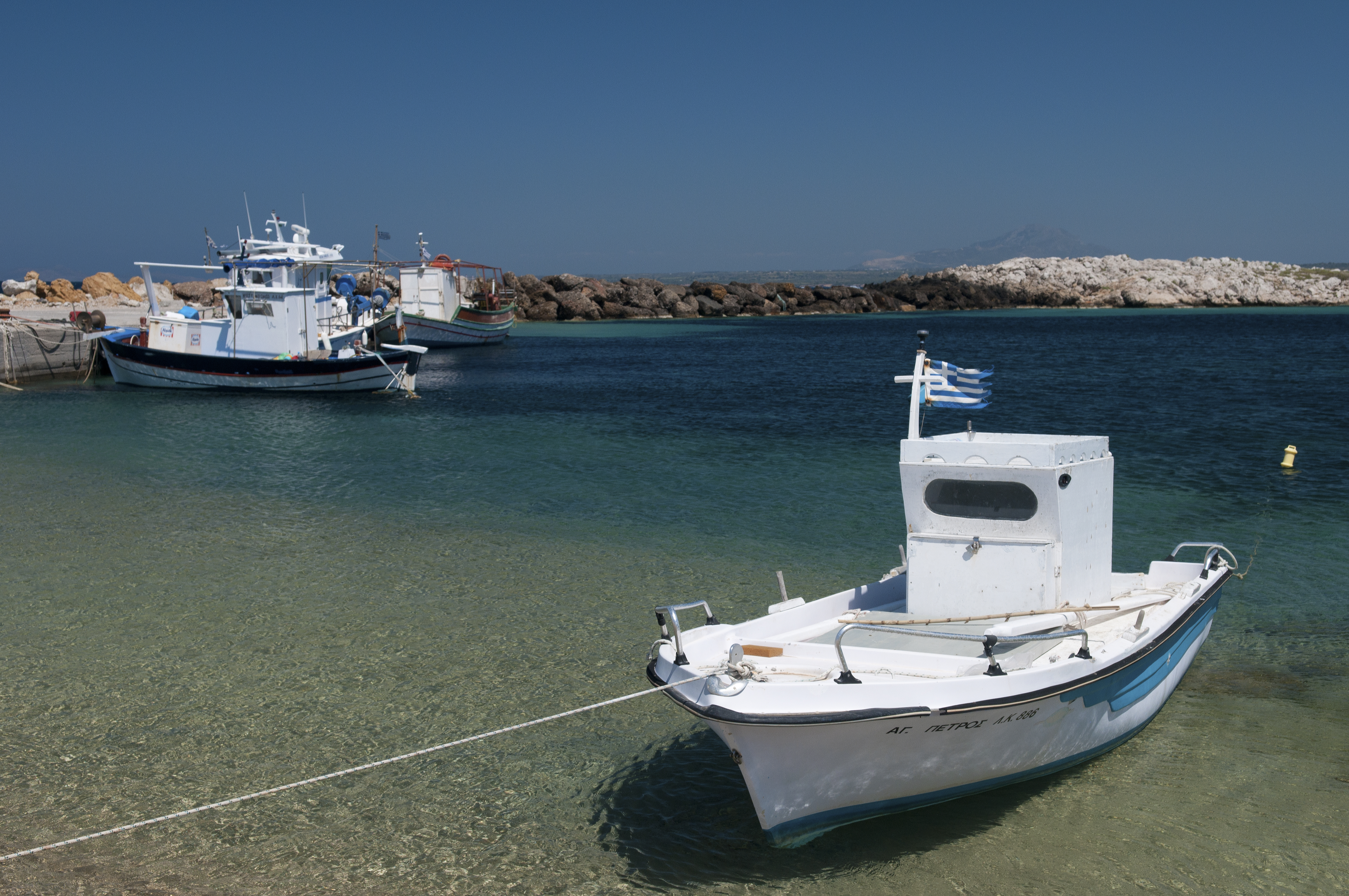 Limnionas, Kos, Greece